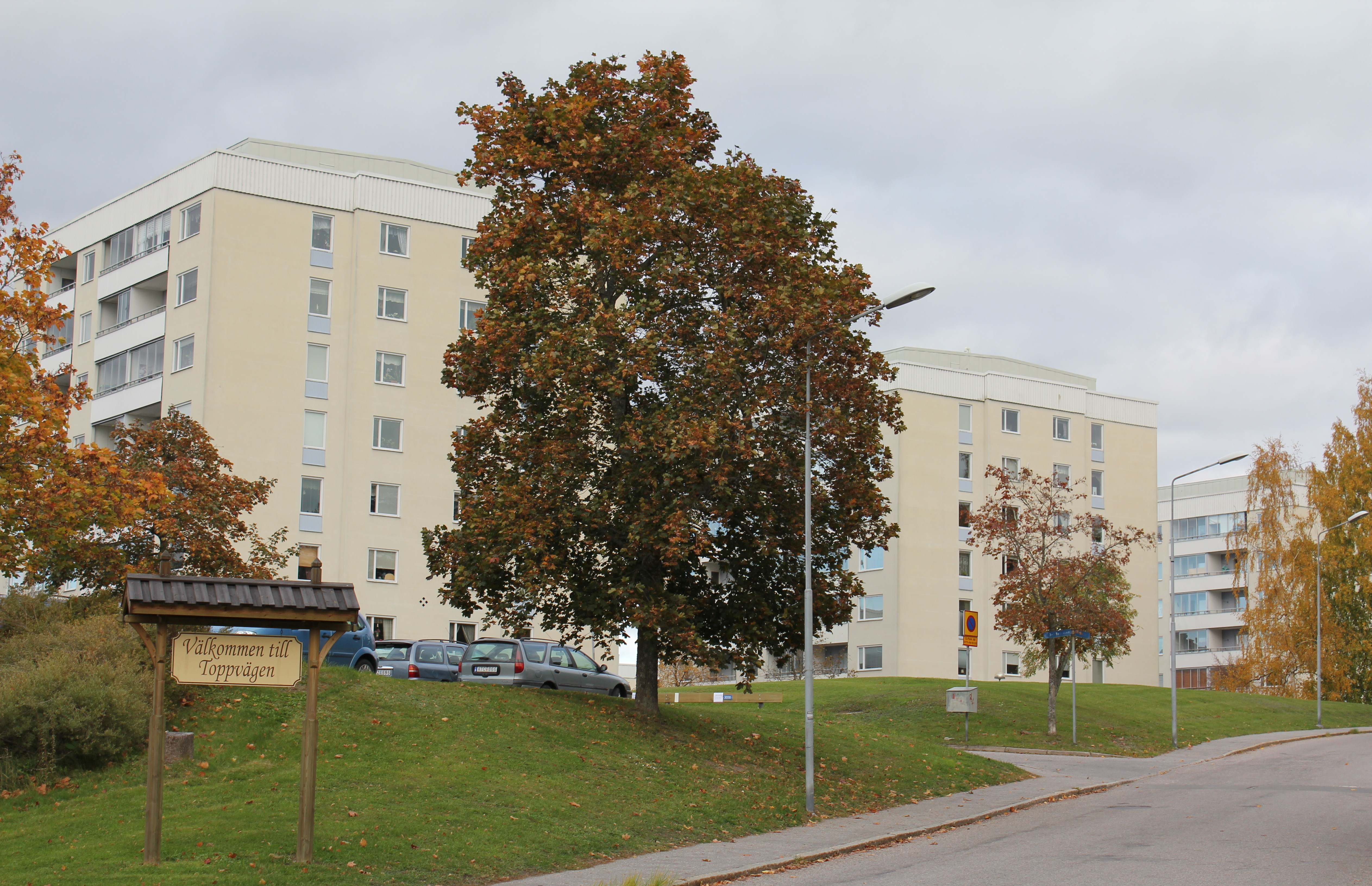 Bebyggelse på Toppvägen i Storvreten, Botkyrka kommun.